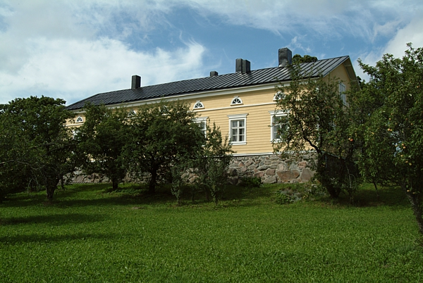 Hirvilahden kartanon päärakennus takaa